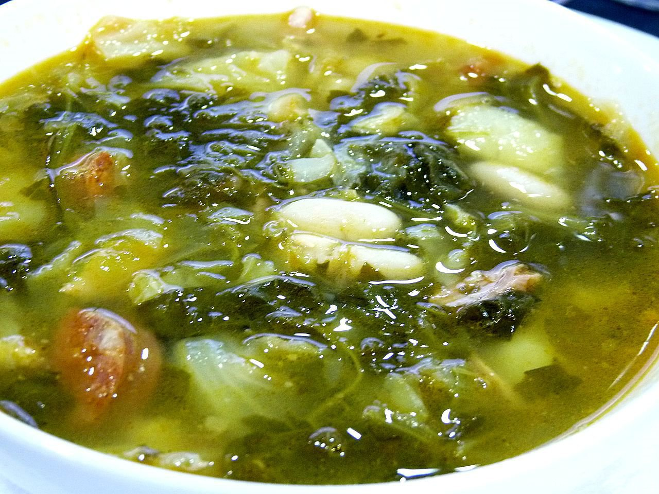 Caldo gallego.